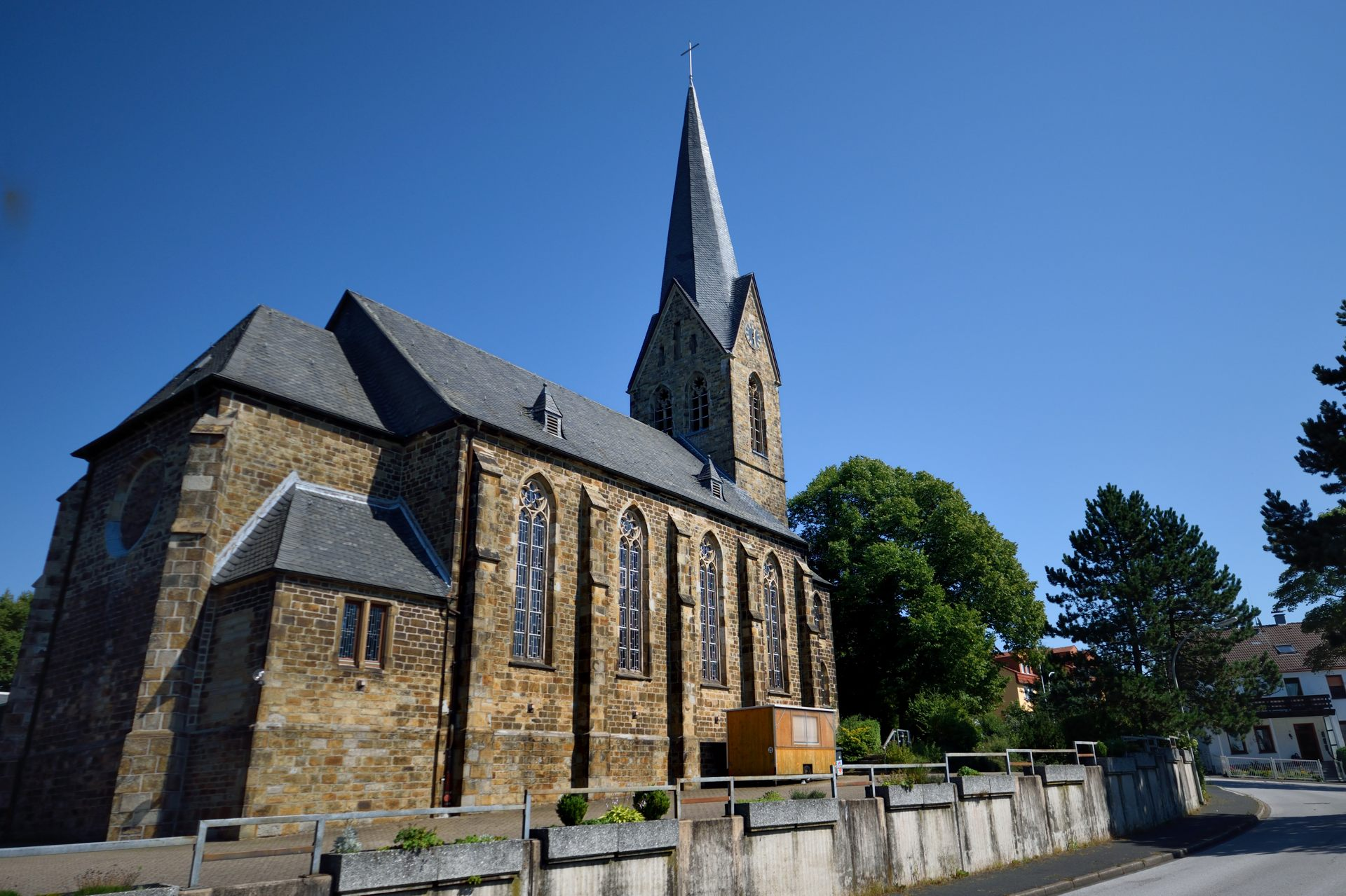 Denkmalgeschützte evangelische Kirche Silschede, Gevelsberg